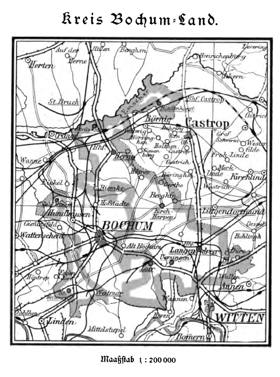 Übersichtskarte des Kreises Bochum-Land, 1907